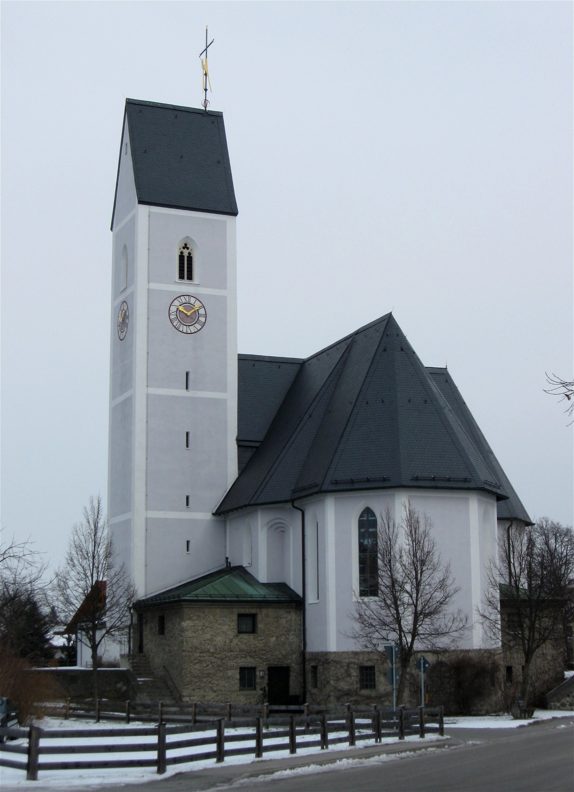 Kath. Pfarrkirche St. Ursula, Kirchdorf a. Inn, Raubling